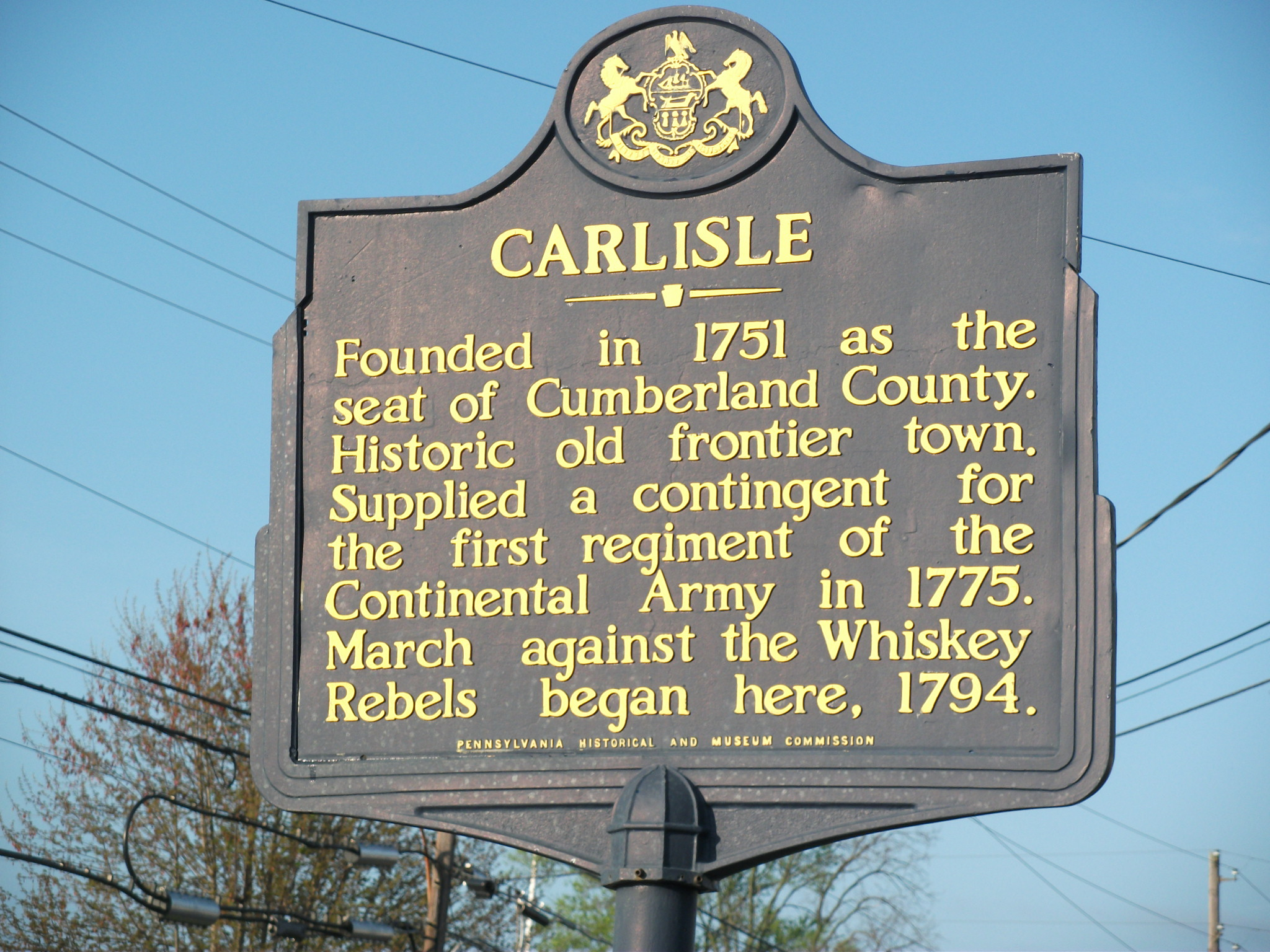 Carlisle, Pennsylvania